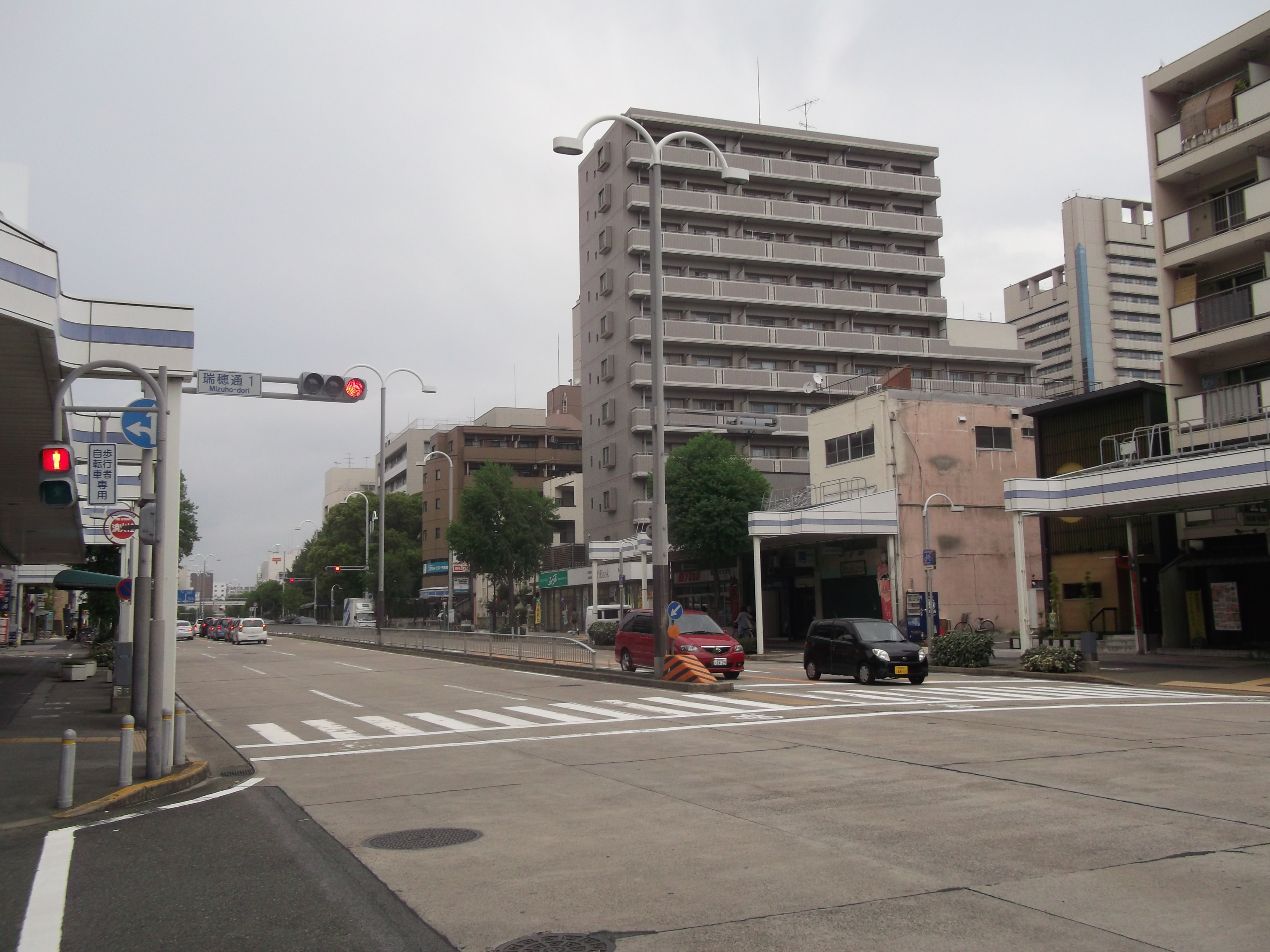 名古屋市瑞穂区瑞穂通1丁目の名古屋市道名古屋環状線「瑞穂通1」交差点を南西側より撮影